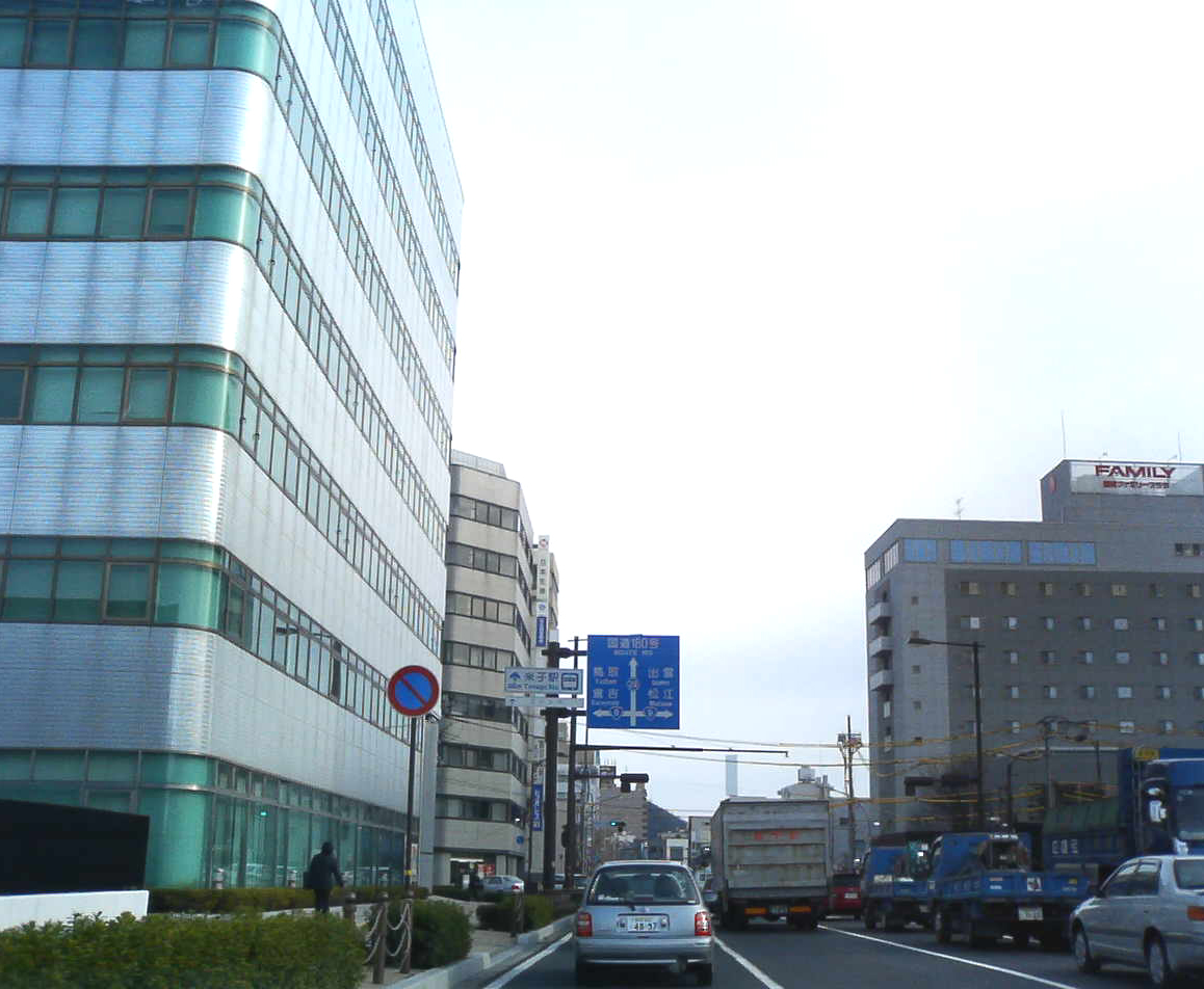 鳥取県道47号米子境港線、米子市内